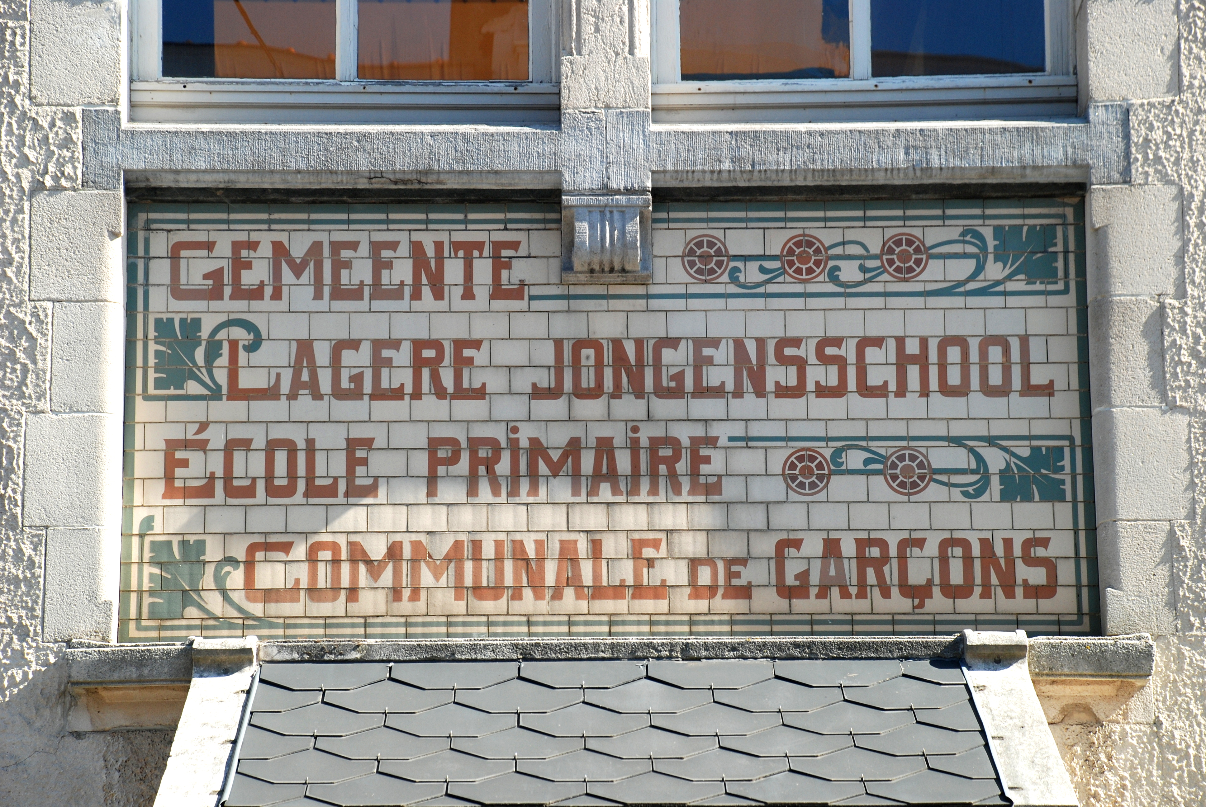 Belgique - Bruxelles - Centre scolaire du Souverain